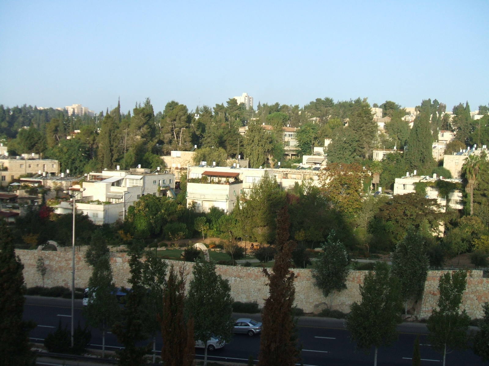 Beit Hakerem, Jerusalem (view from east)